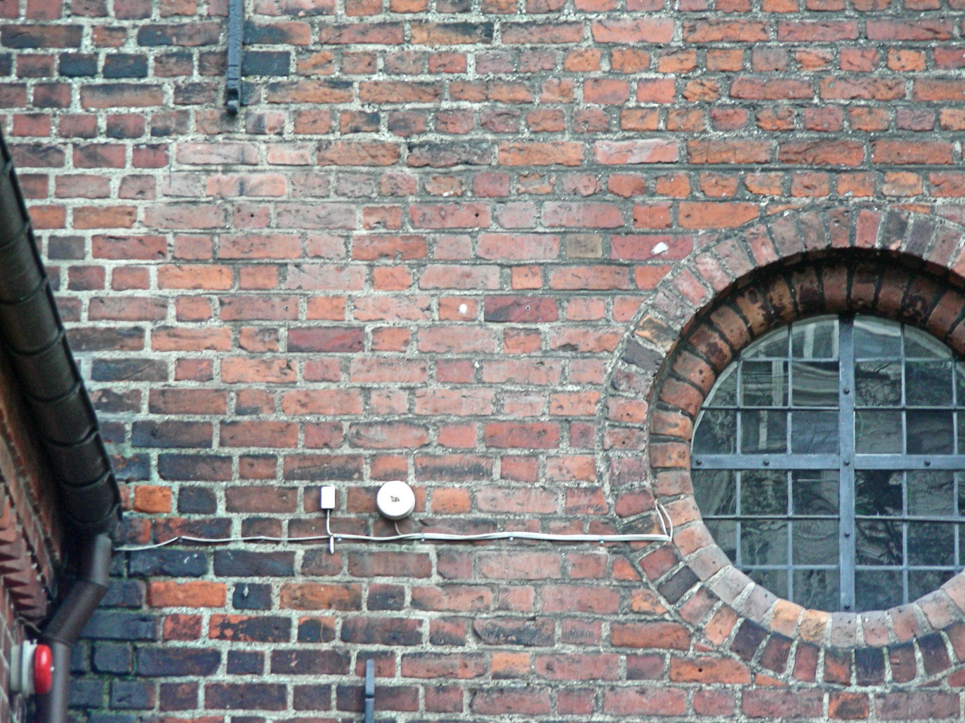 Helligåndskirken, Copenhagen, Denmark. Tower wall detail. Change of bond between old part and new part.